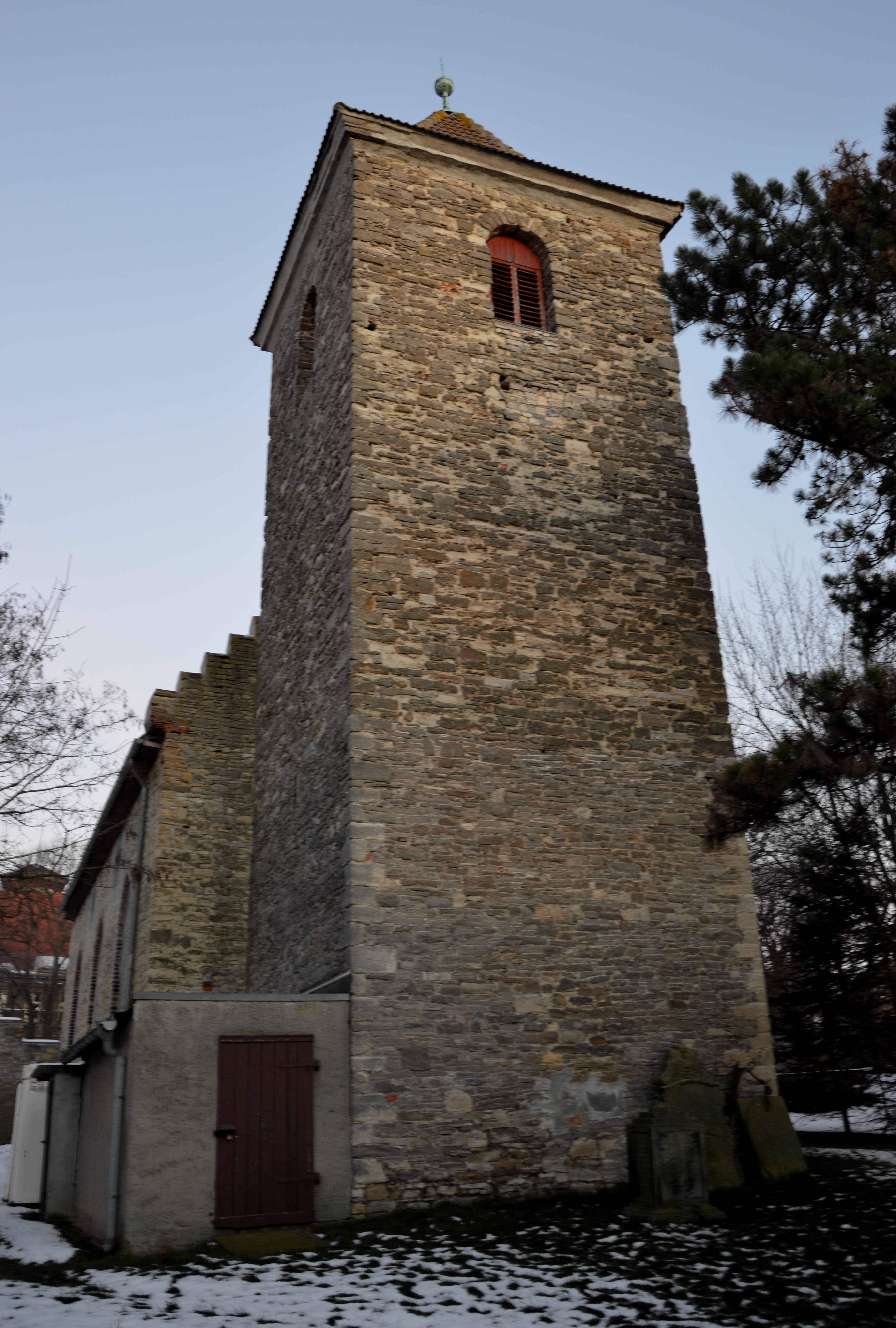 Dorfkirche Hohenerxleben